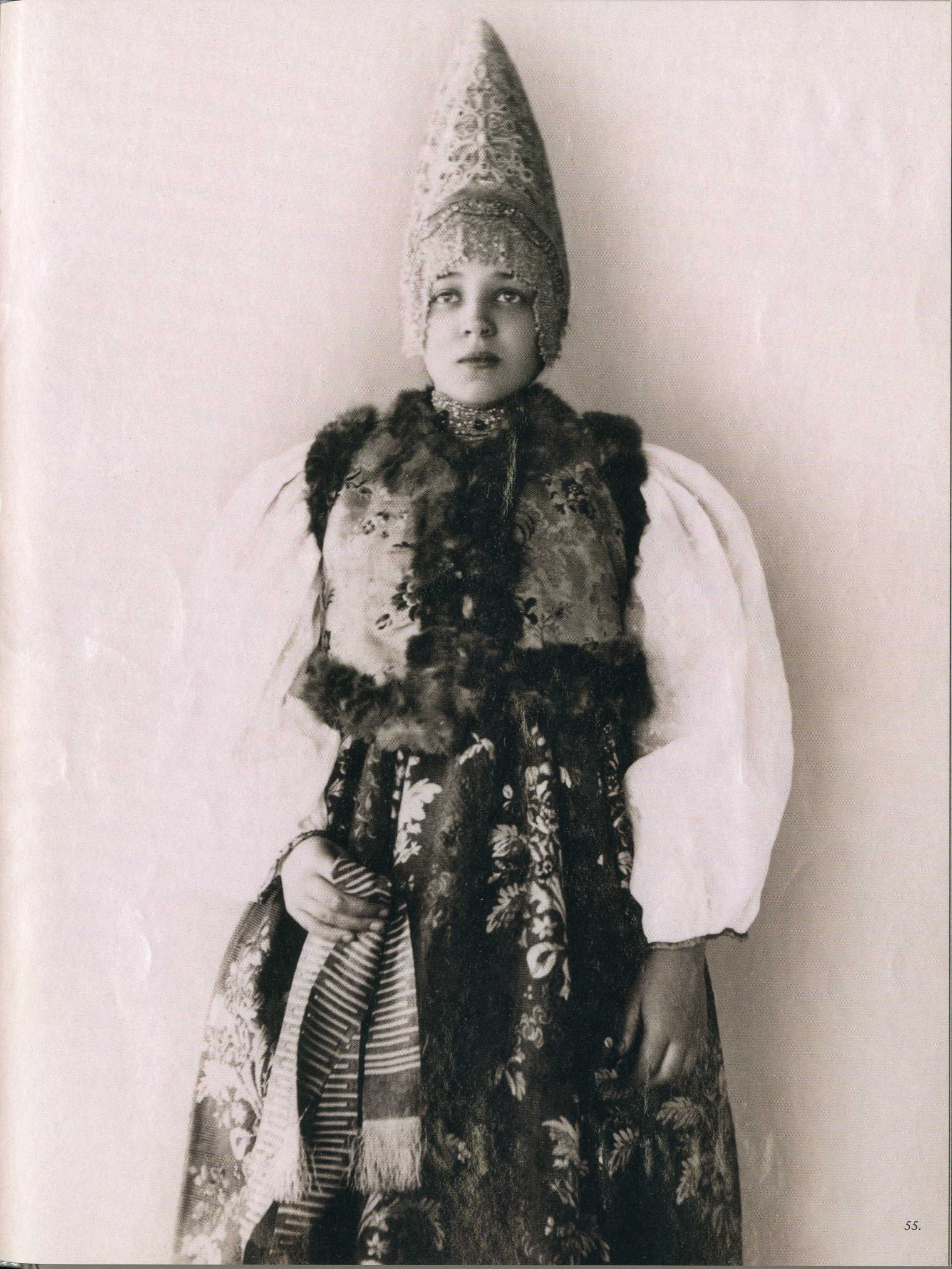 Фотографии коллекции Шабельских из собрания российского этнографического музея